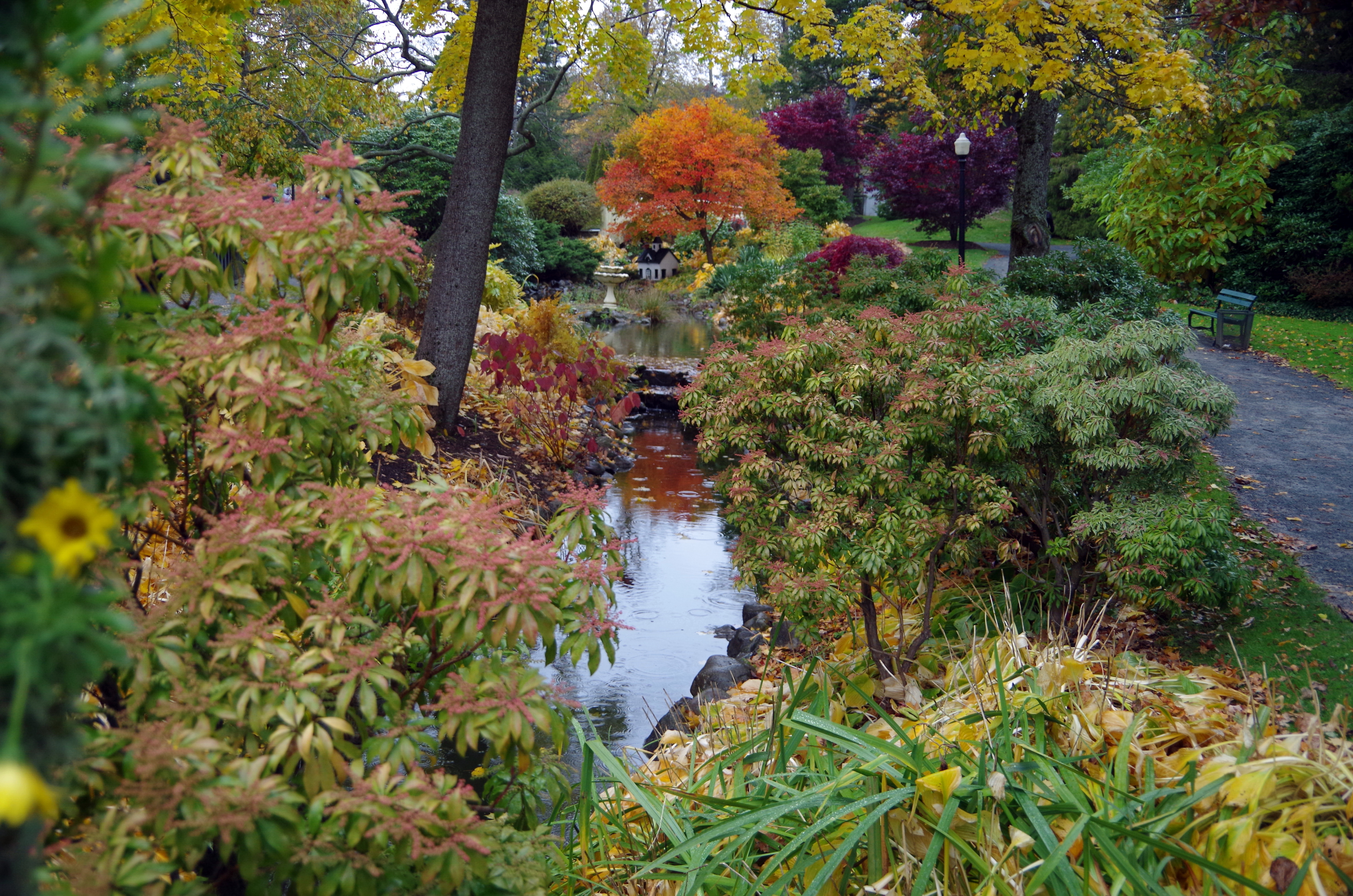 Public Garden im Hertbst